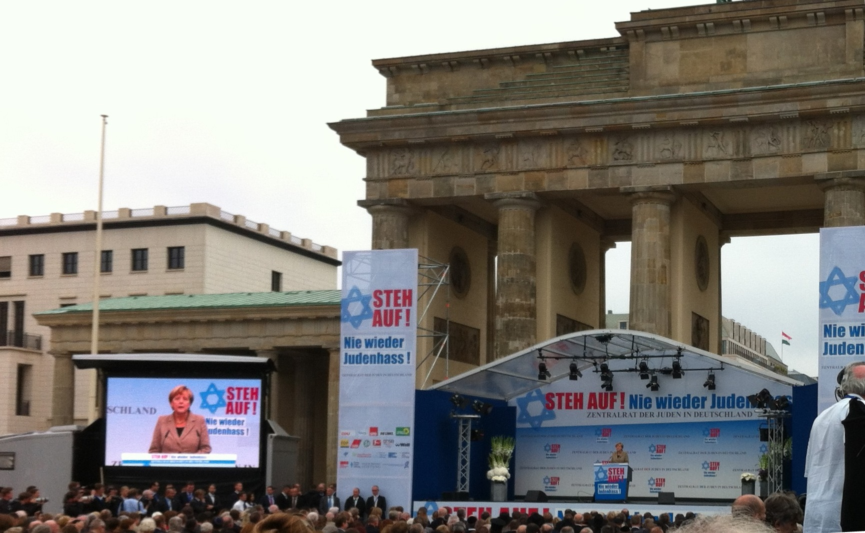 Angela Merkel durant son discours à la manifestation contre l'antisémitisme à la porte de Brandebourg le 14 septembre 2014